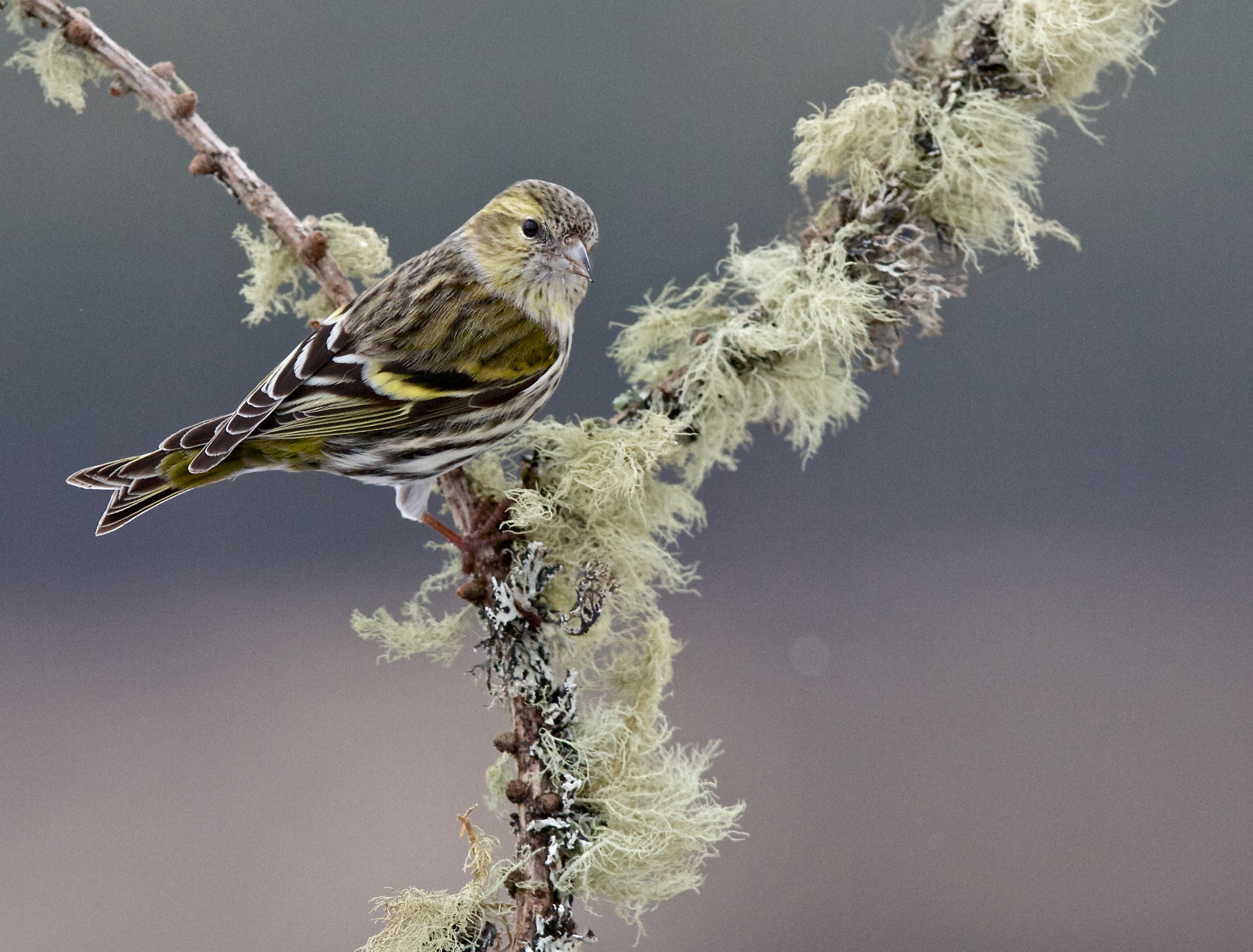 Glenfeshie